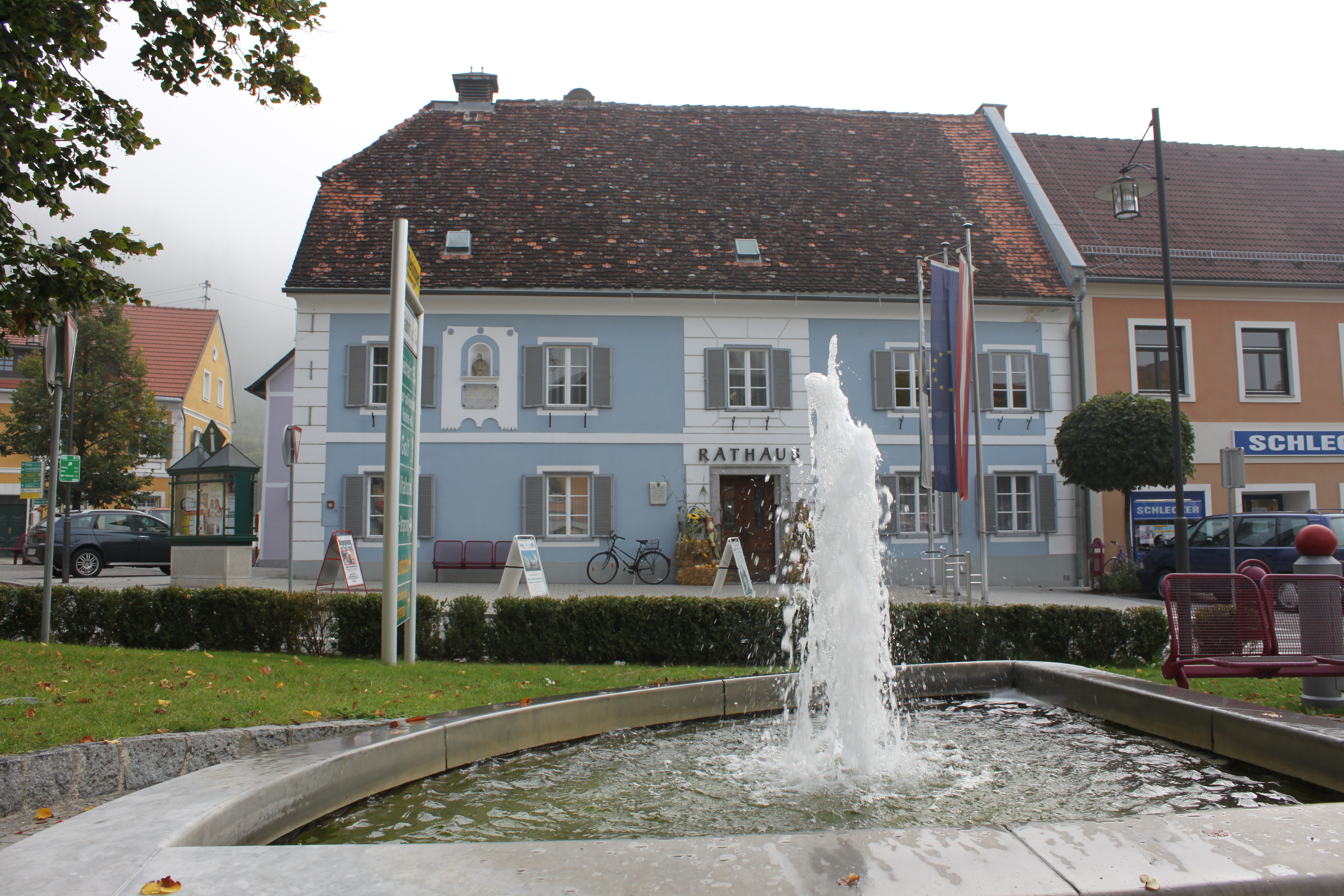 Passailer Rathaus